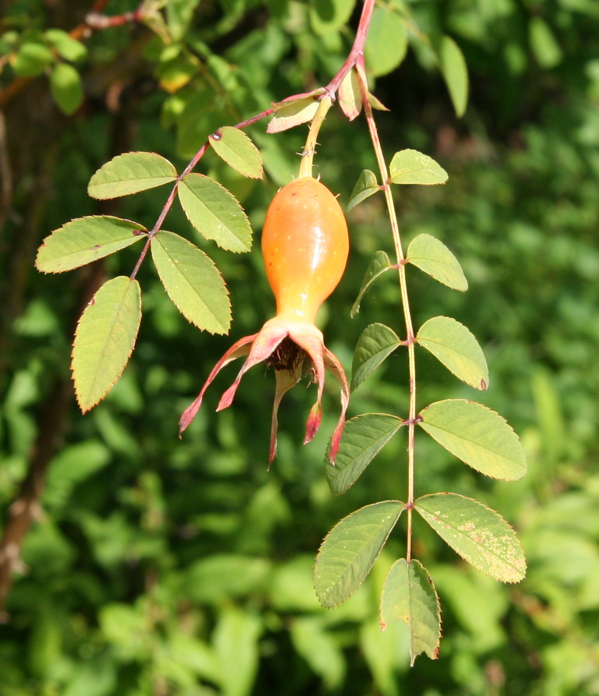 Rosa moyesii im Botanischen Garten Dresden